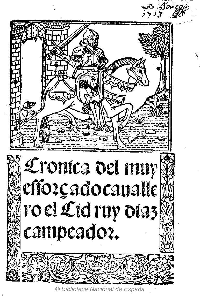 Cronica del muy esforçado cauallero el Cid ruy diaz campeador Autor: Cromberger, Jacobo ; Cromberger, Juan Fecha: 1525 Datos de edición: Fue impresso en Seuilla : por Iacobo cromberger aleman y Iuan Cromberger, 1525 El qual se acabo a xxij dias d'l mes de Nouiebro